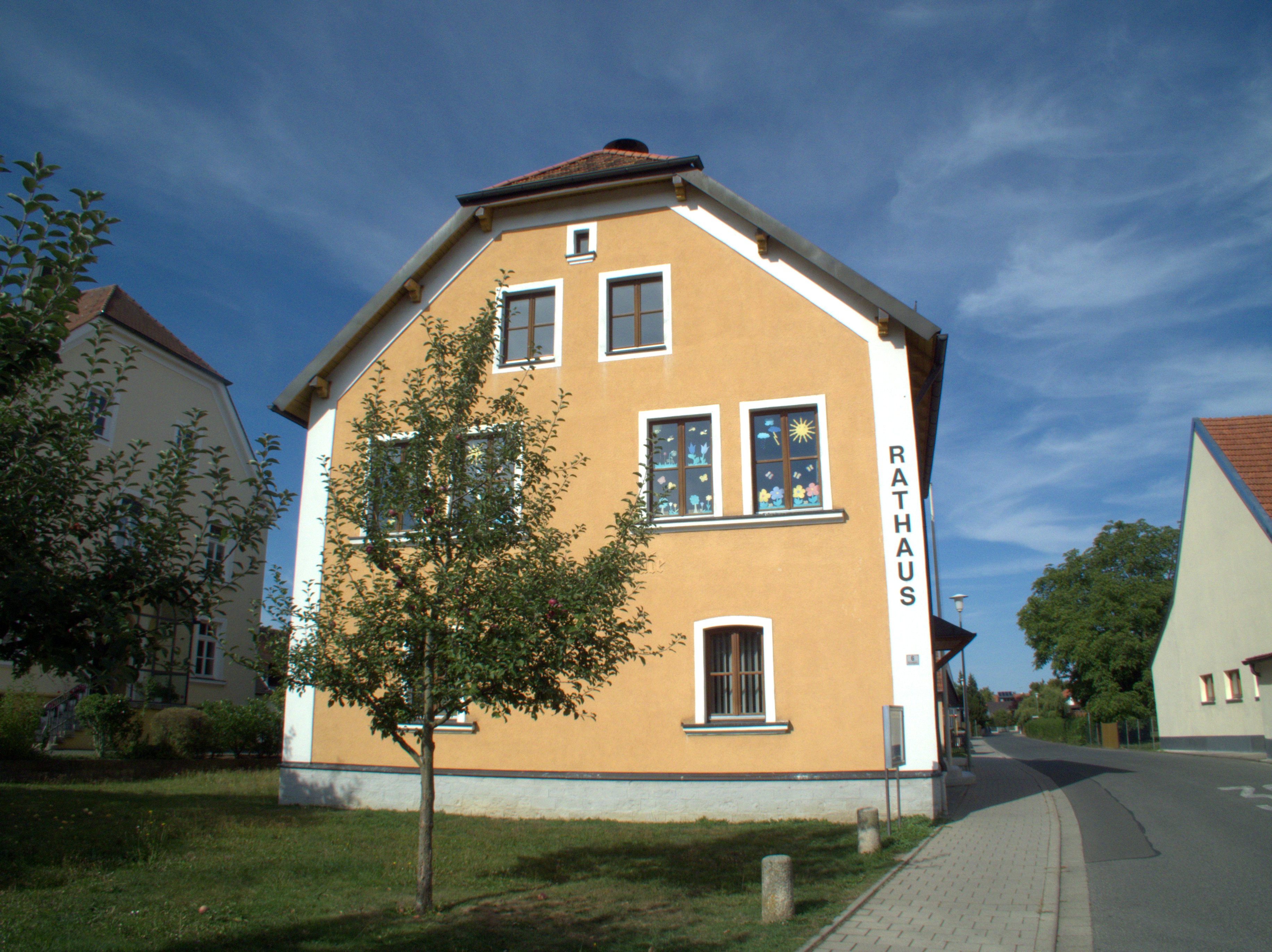 Die ehemalige Mädchenschule am Berngauer Ramoldplatz dient heute als Rathaus